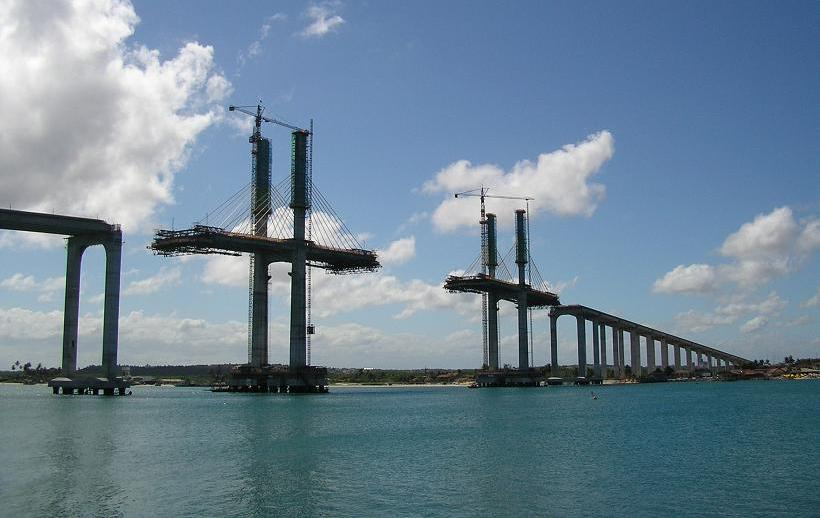 Ponte Forte-Redinha, em Natal, Brasil.